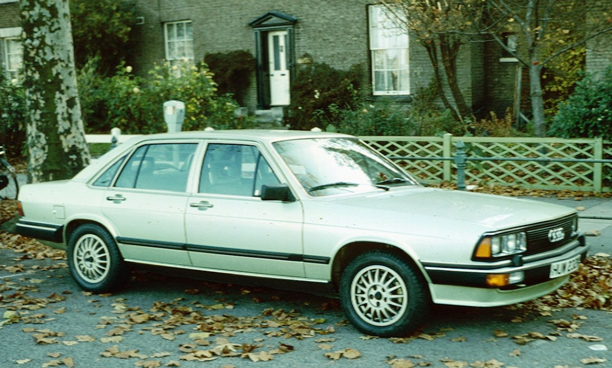 Audi 200 Park Terrace